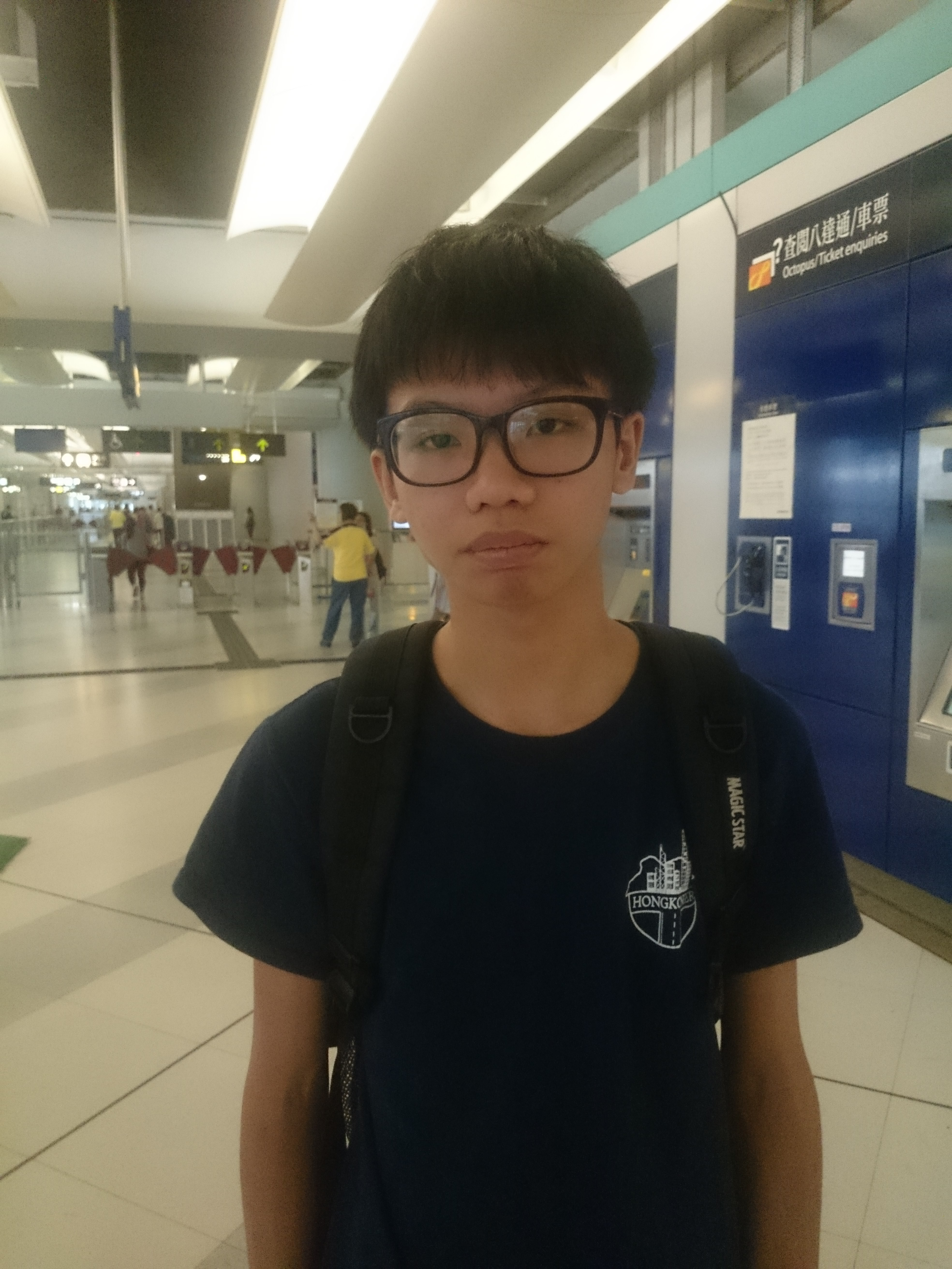 粵語: 開埠177年（2017年）5月14號下晝，鍾翰林企咗喺元朗西鐵站一陣。